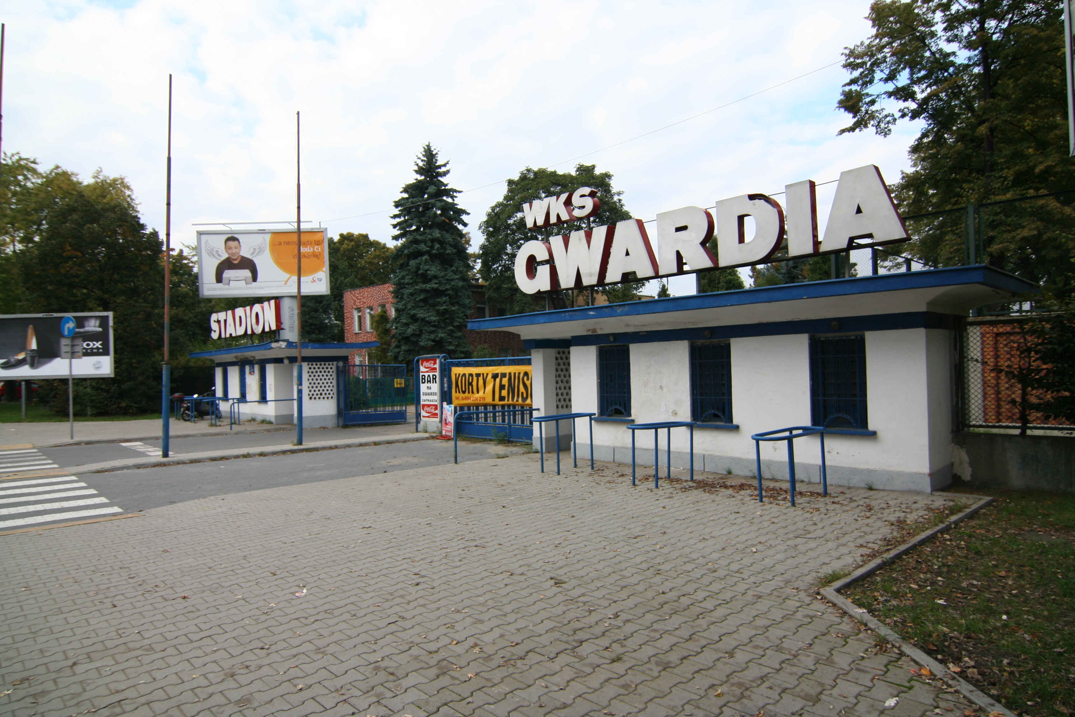 Gwardia Warszawa - wejscie